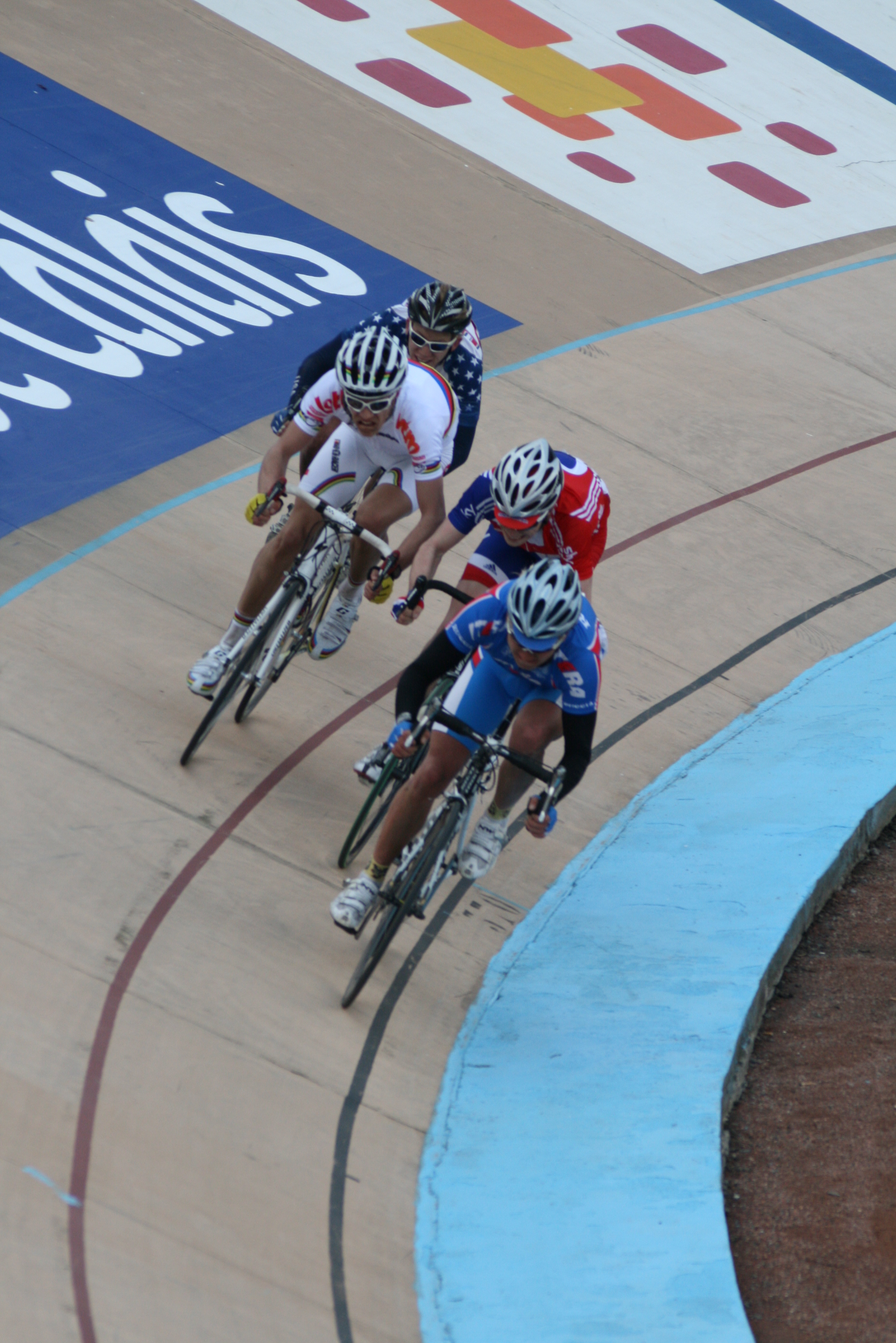 Daniel Mclay, Kiril Yatsevich, Jasper Stuyven et Lawson Craddock à l'arrivée de Paris-Roubaix Juniors 2010